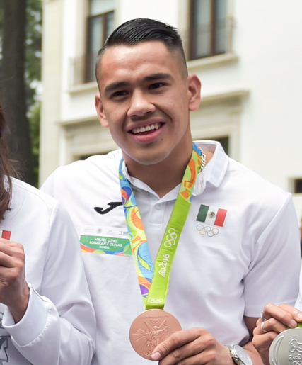 El Presidente Enrique Peña Nieto se reunió hoy con los deportistas que integraron la delegación mexicana que participó en los Juegos Olímpicos de Río de Janeiro 2016, a quienes les expresó su reconocimiento por el esfuerzo, la entrega, el empeño y el coraje que demostraron en esta justa olímpica y durante el proceso para llegar a ella.